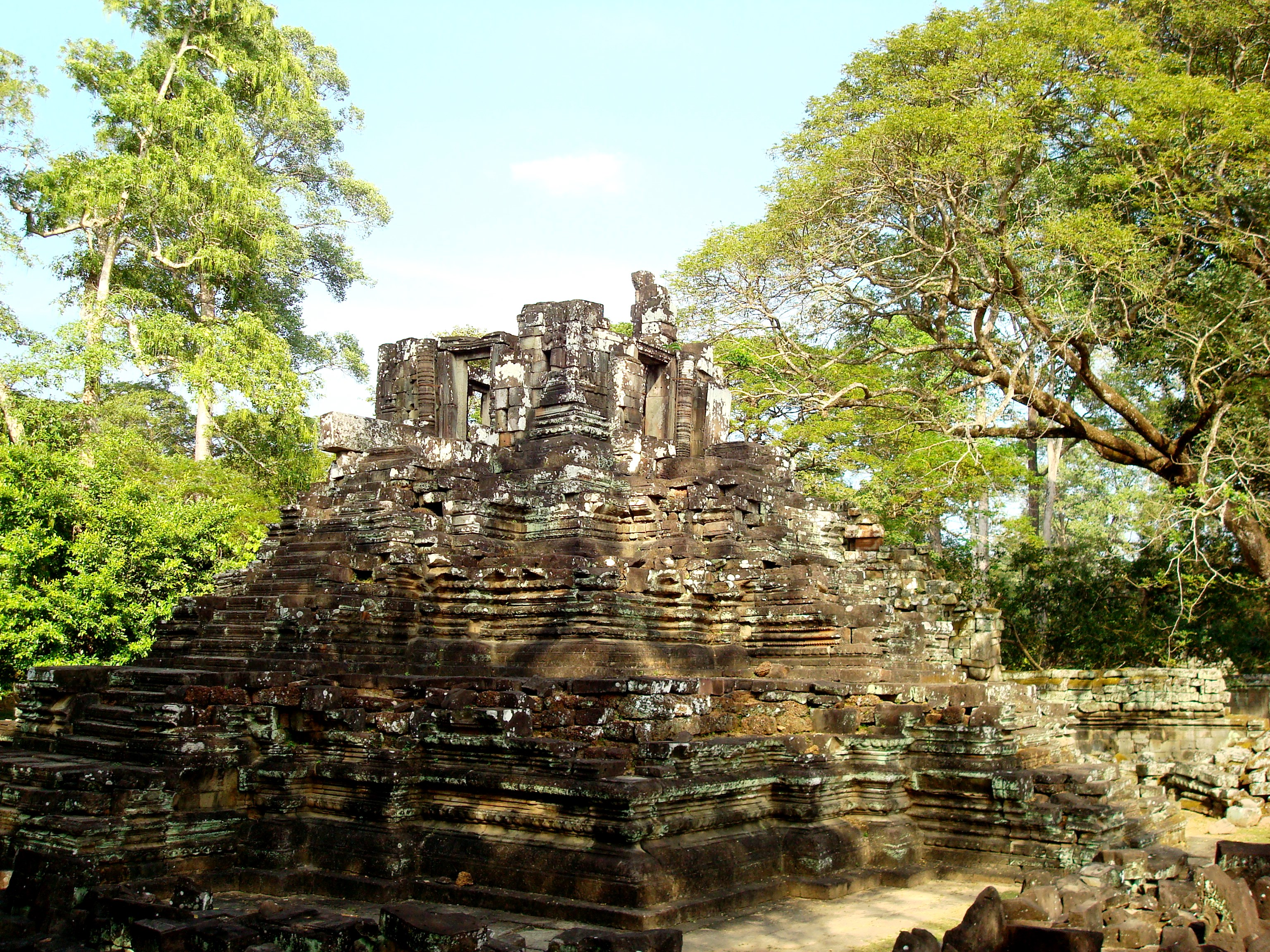 Tempel T